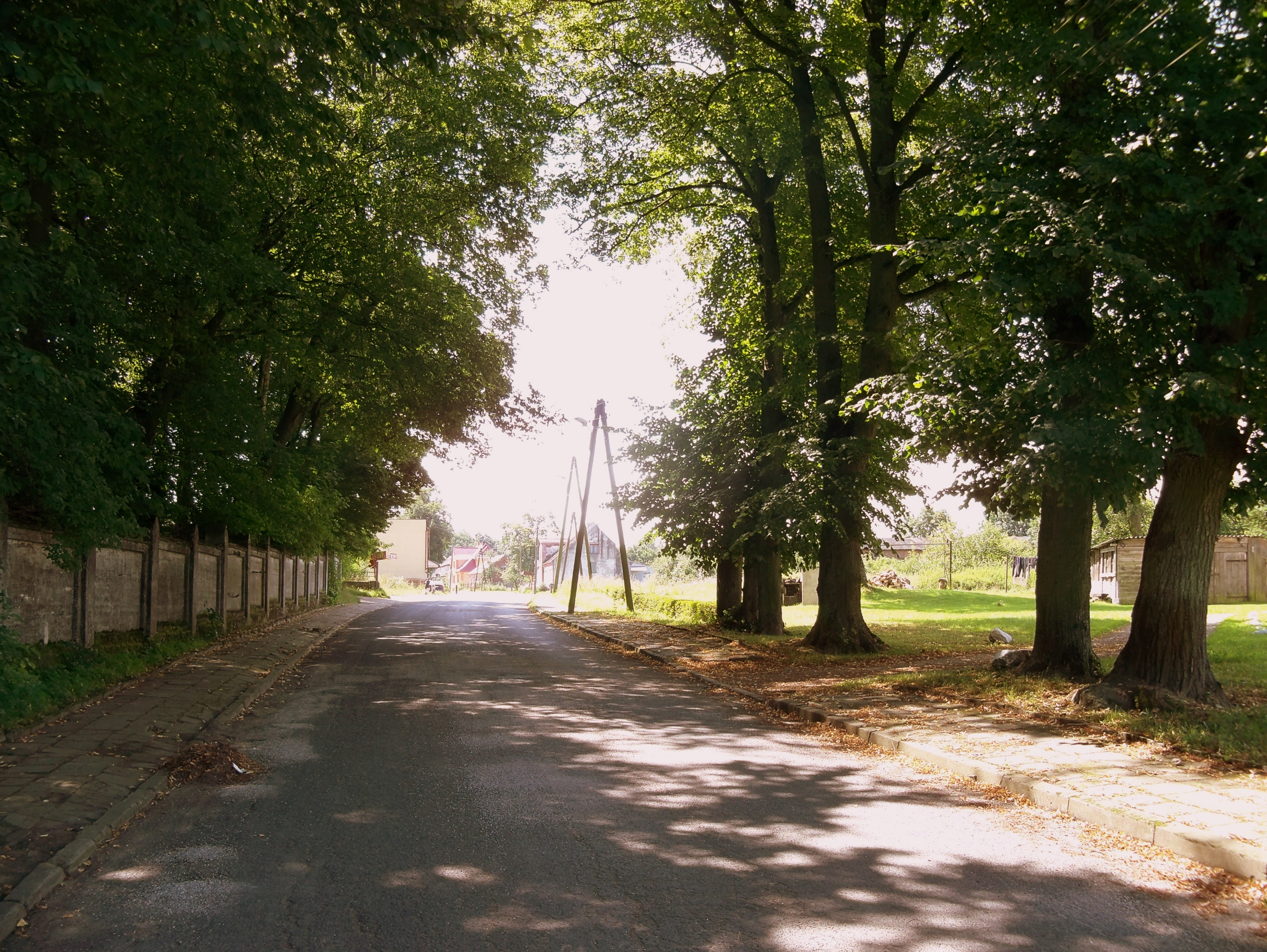 Rzecino